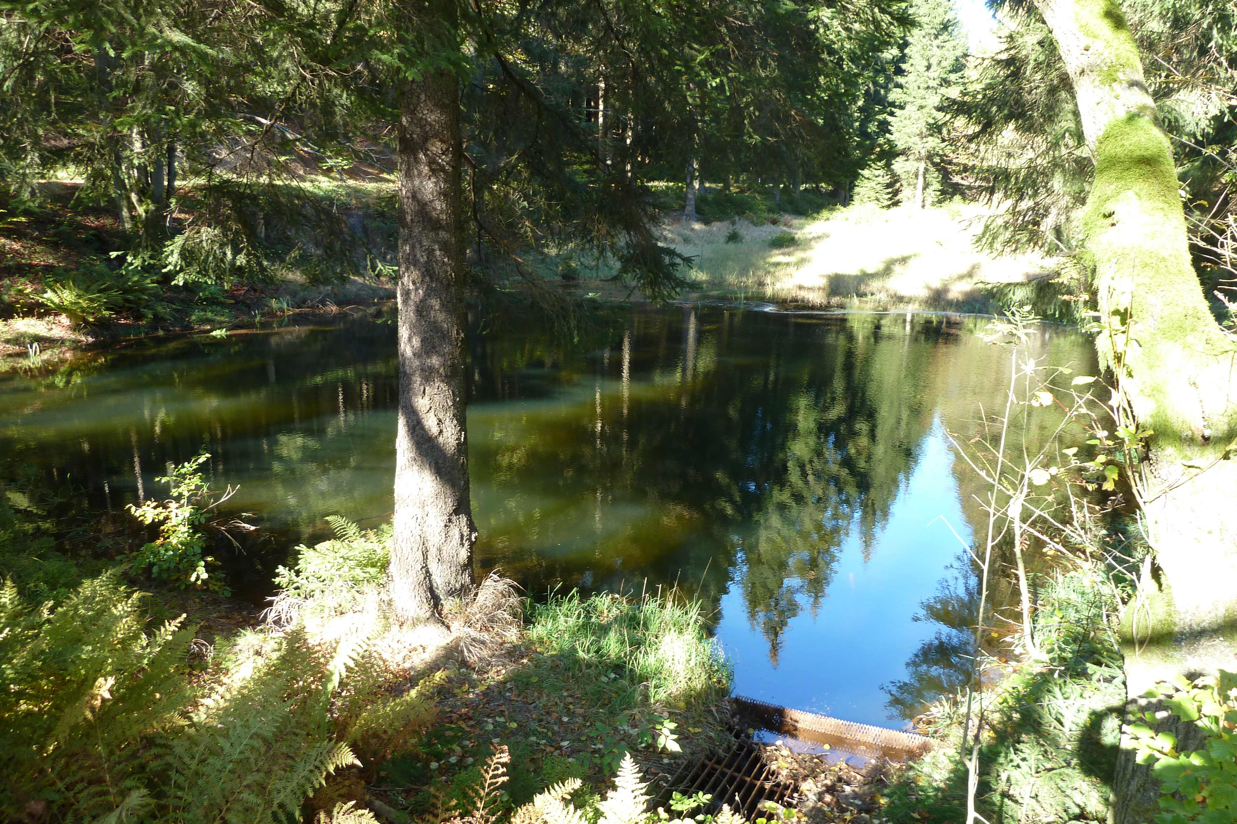 Ehemaliger Flößteich, vor 1712, Siegmundsburg, Landkreis Sonneberg